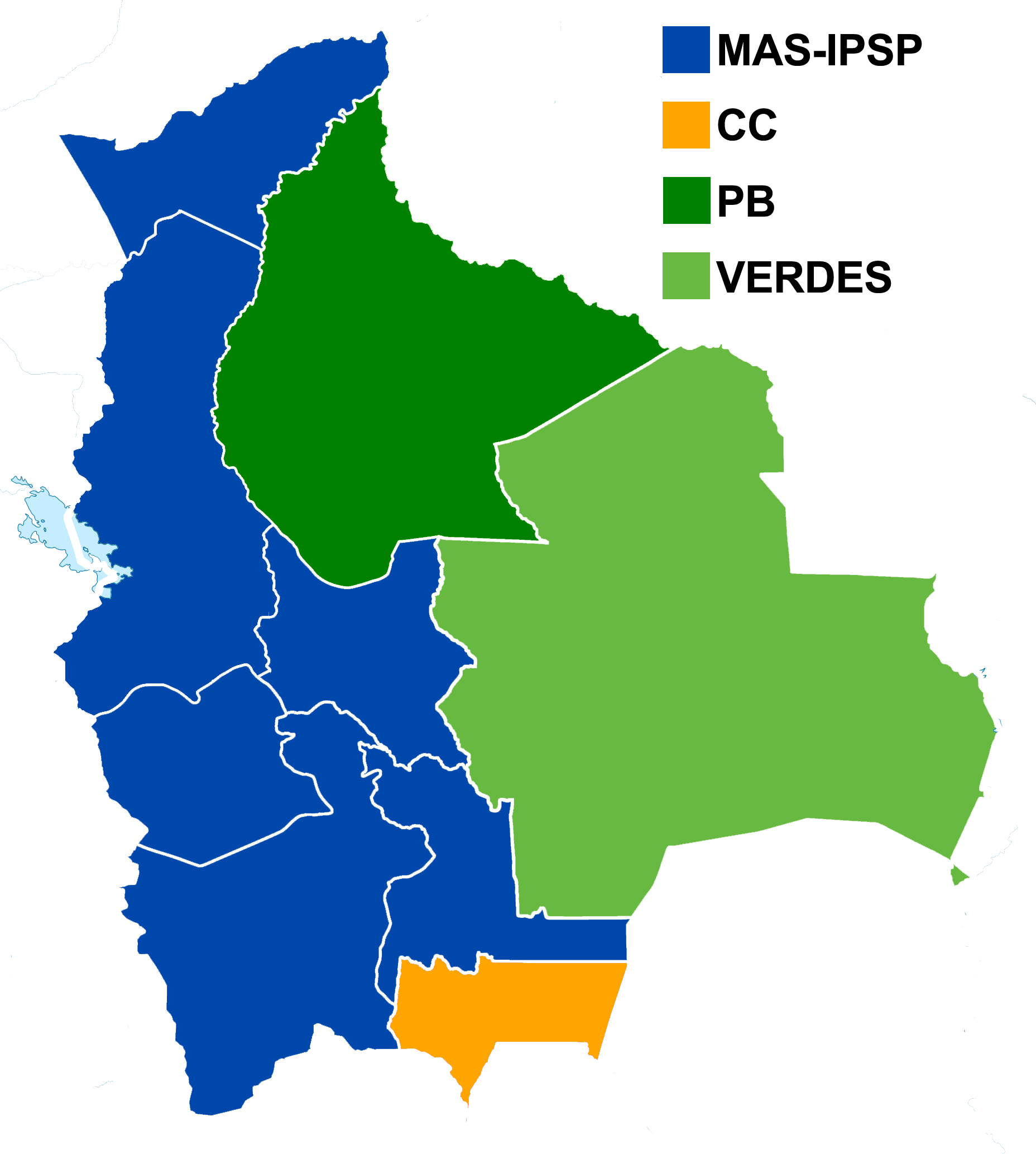 Vencedor por departamento en las elecciones de gobernadores departamentales de Bolivia de 2015: Azul: MAS-IPSP; Verde claro: Movimiento Demócrata Social; Verde oscuro: Primero el Beni; Naranja: Camino al Cambio